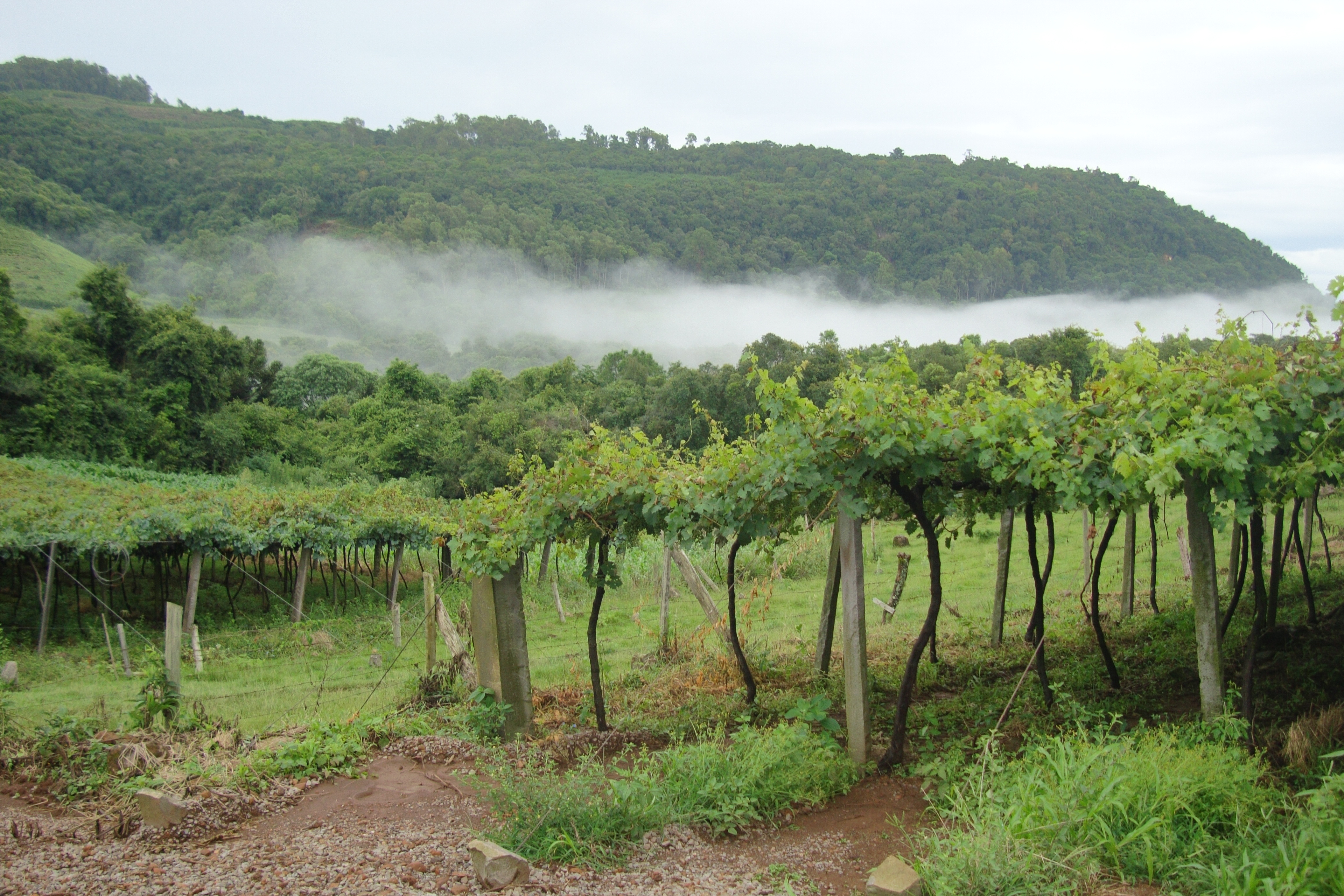 Vindima em Mato Perso, Flores da Cunha, Rs, Brasil